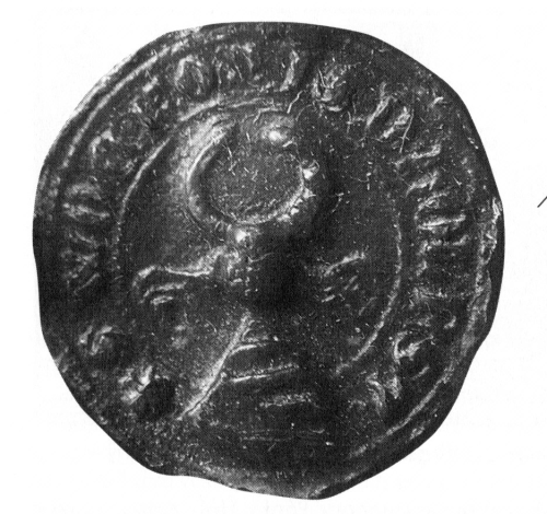 Pečeť Voka I. z Holštejna